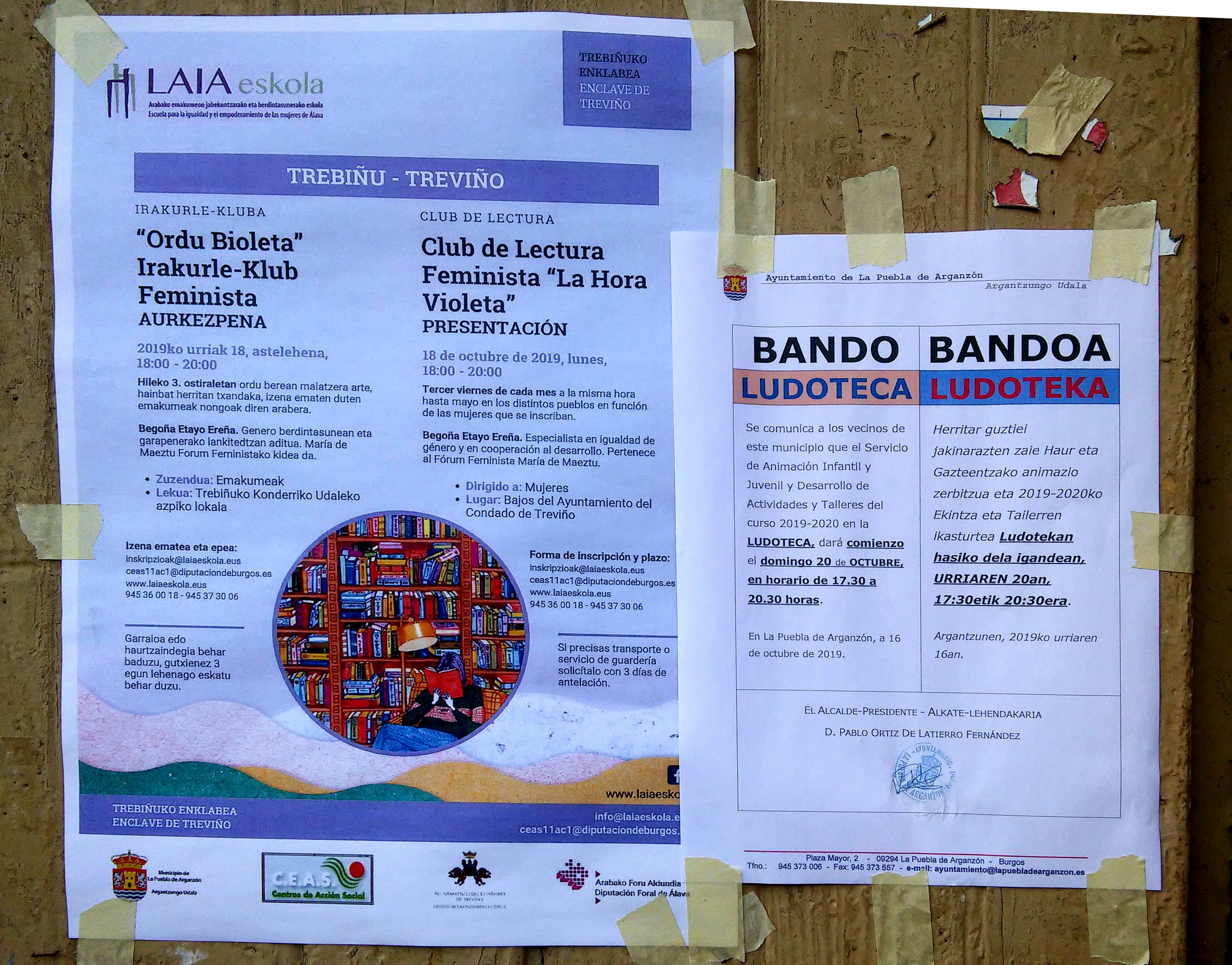 Udalaren eta elkarteen kartel elebidunak (gaztelania eta euskara) Argantzunen